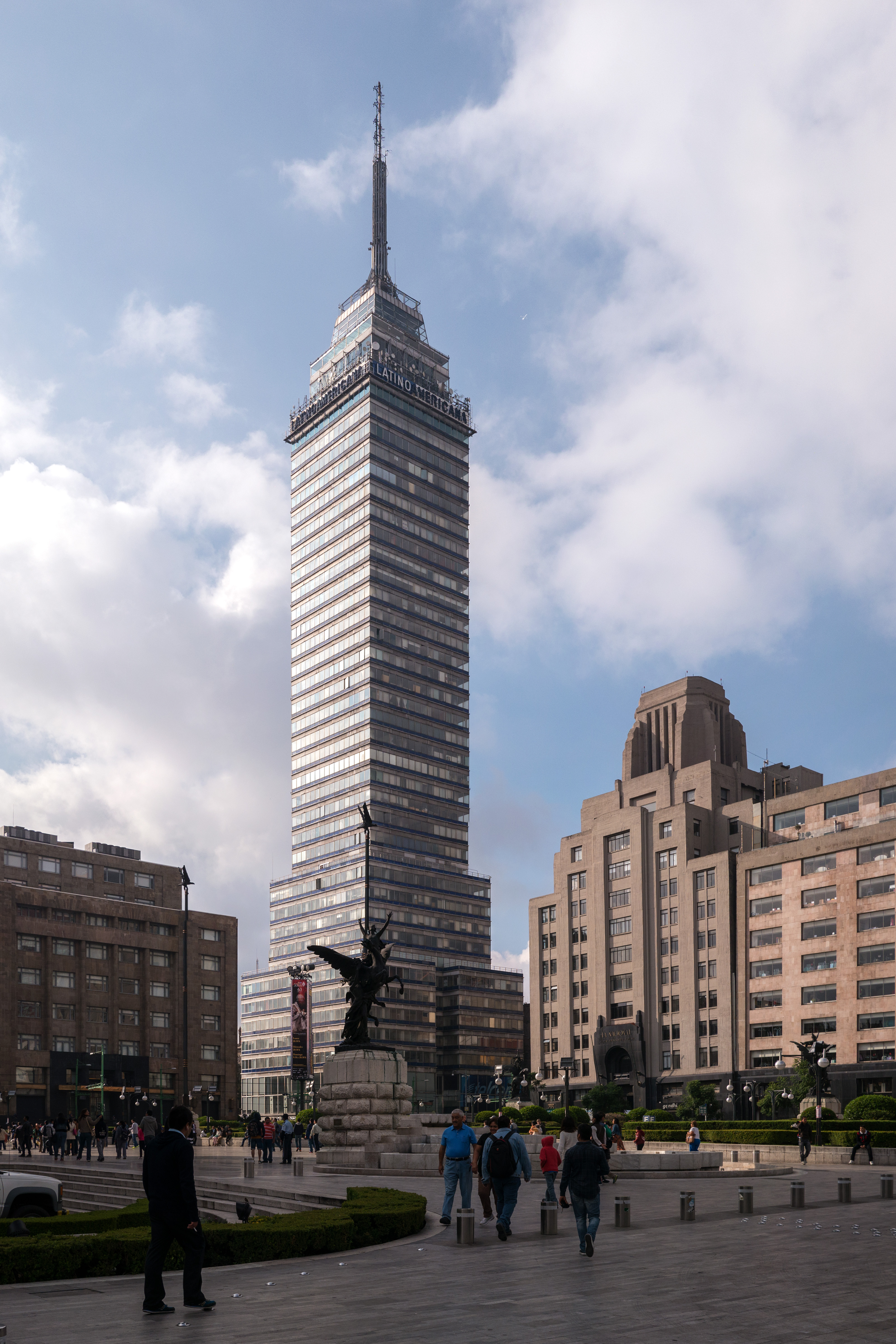 Mexico df - Torre Latinoamerica